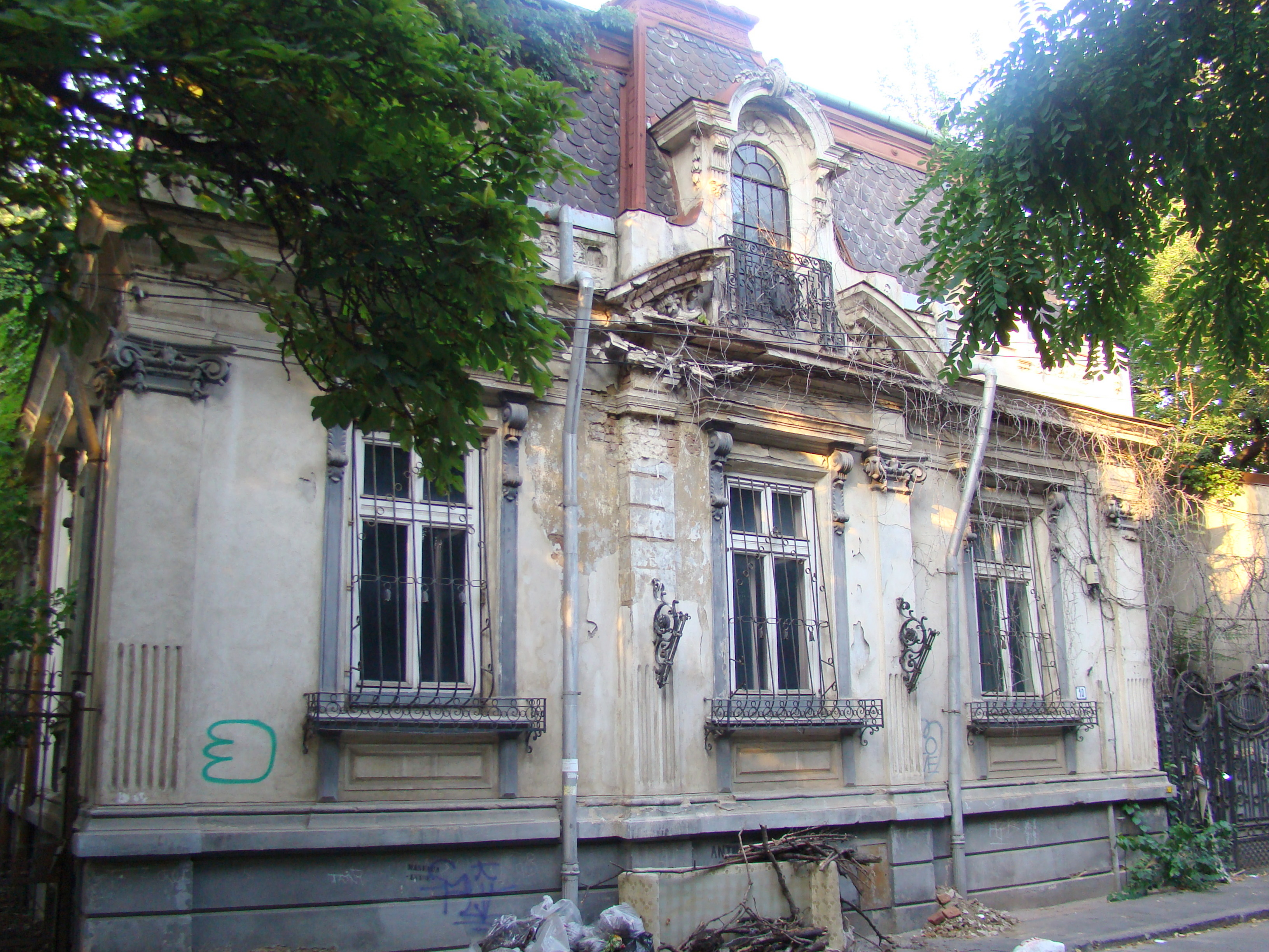 Casă monument istoric, str. Theodor Aman, nr.10